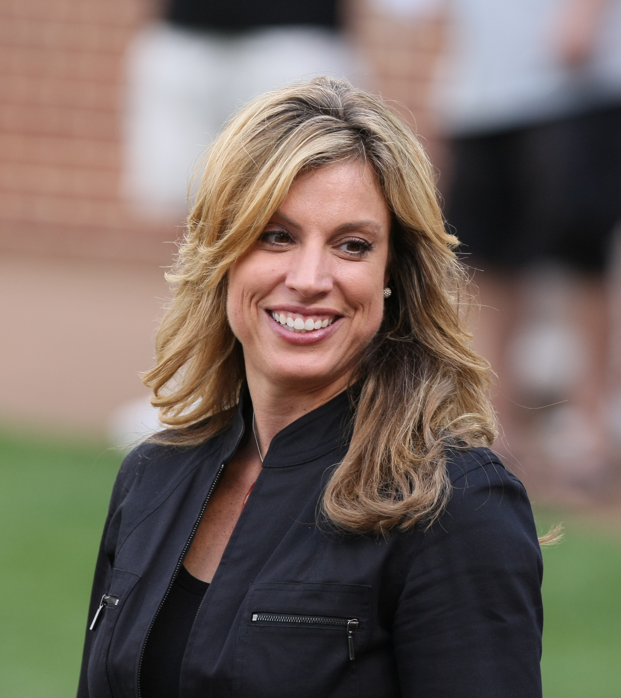 Kim Jones